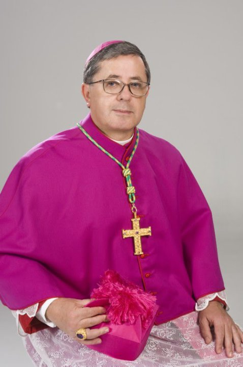 Dom Antônio Keller, em vestes corais.